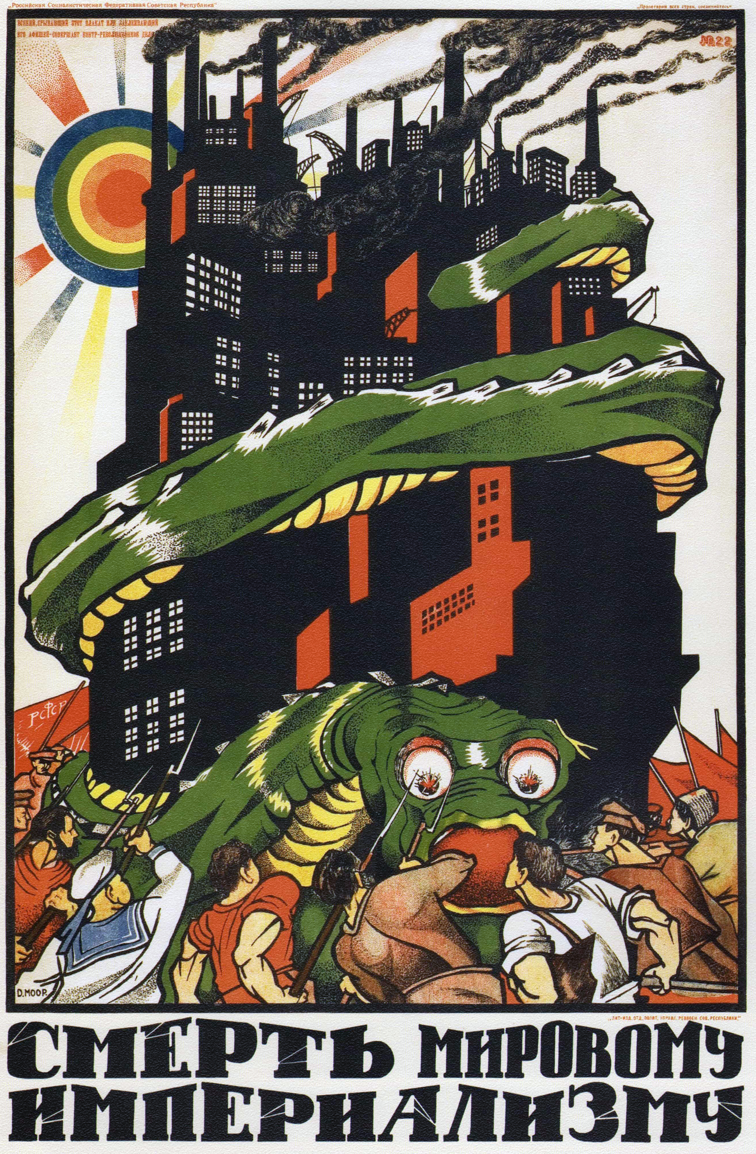 Death of International Imperialism, 1919